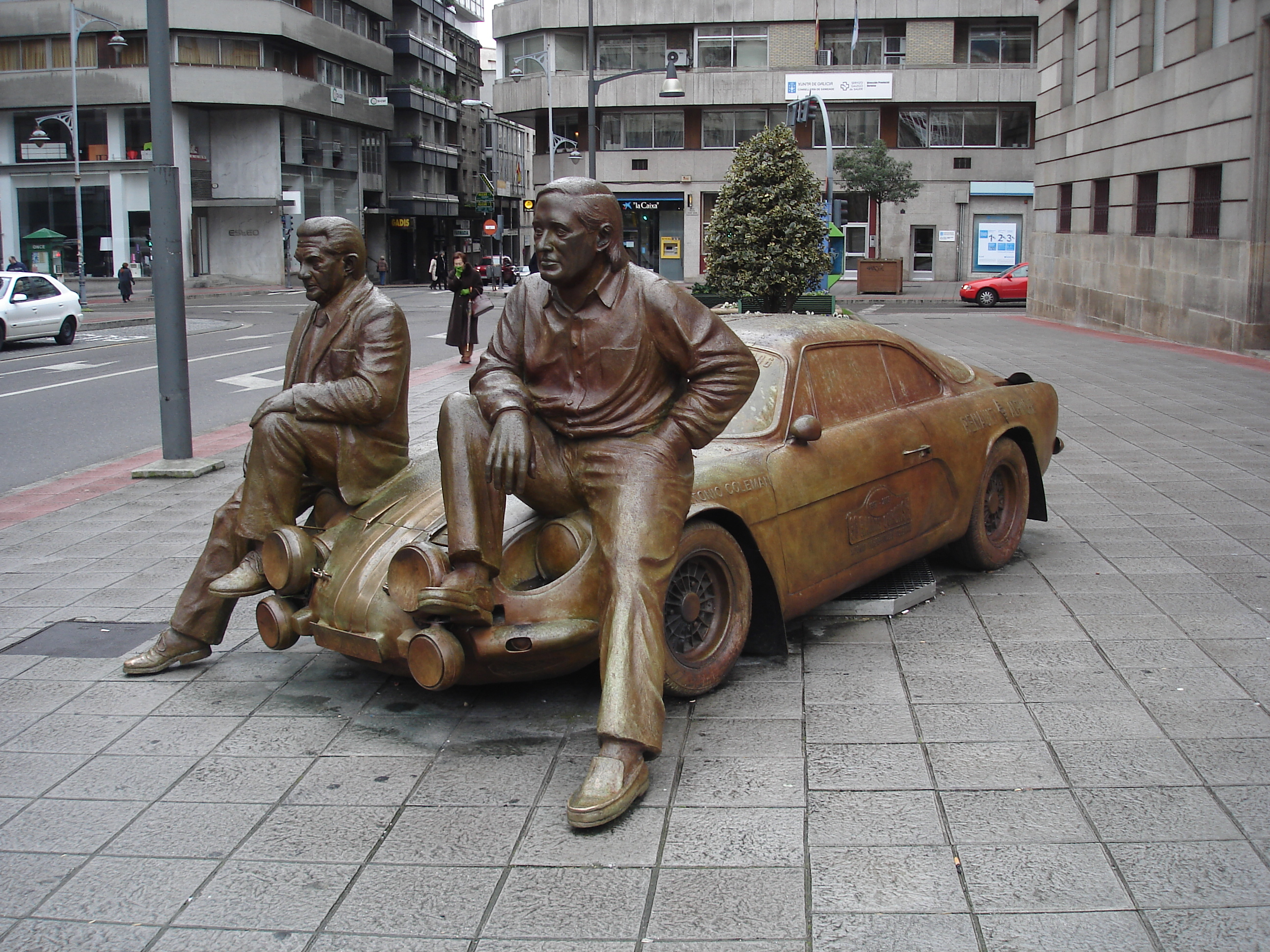 Escultura homenaxe do piloto de rallys Estanislao Reverter Sequeiro, Antonio Coleman e o Alpinche na cidade de Ourense. Obra do escultor Ramón Conde realizada en bronce no ano 2006. Escultura homenaje a Estanislao Reverter, Antonio Coleman y al Alpinche en la ciudad de Ourense. Obra del escultor Ramón Conde realizada en bronce en 2006.